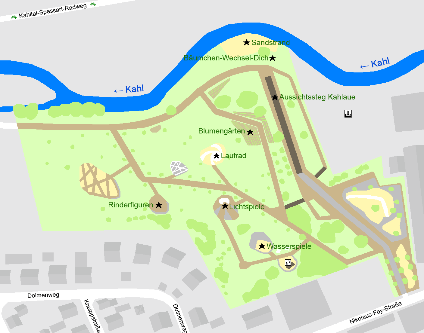 Karte des Energieparks in Alzenau Baum Wiese Wasser Sand Sehenswürdigkeit Spielplatz Gewerbegebiet